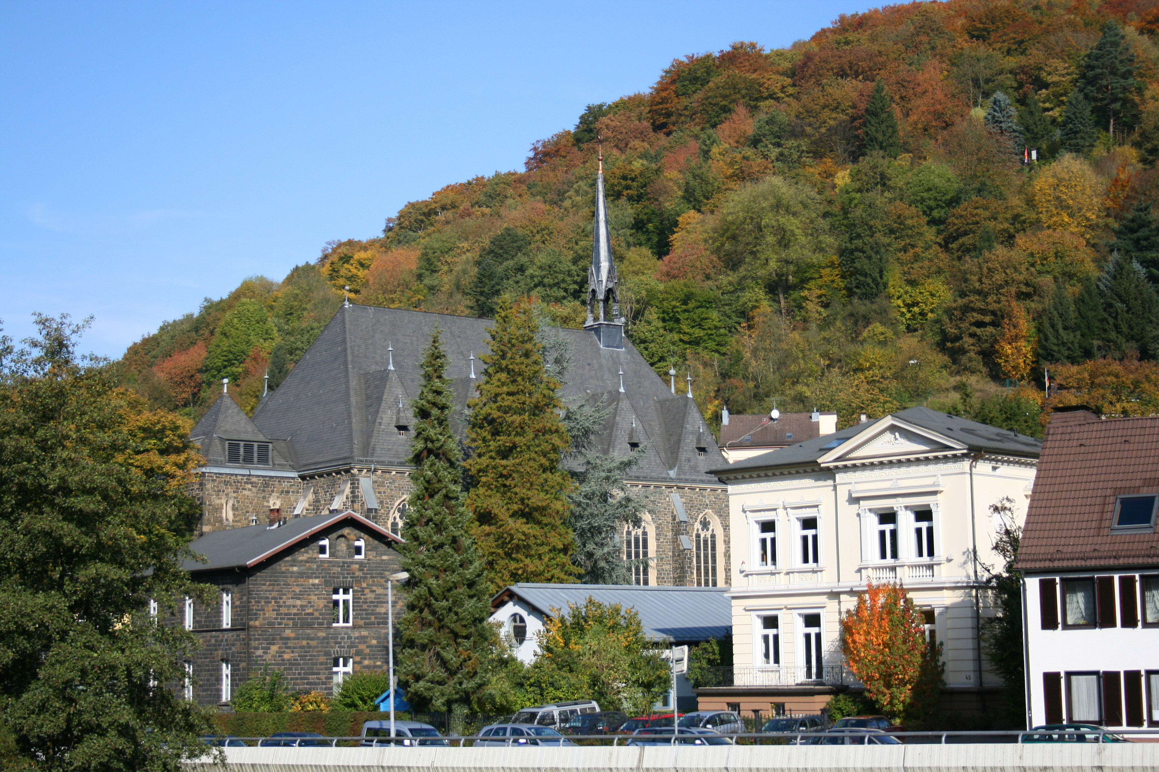 Sankt Matthäus in Altena